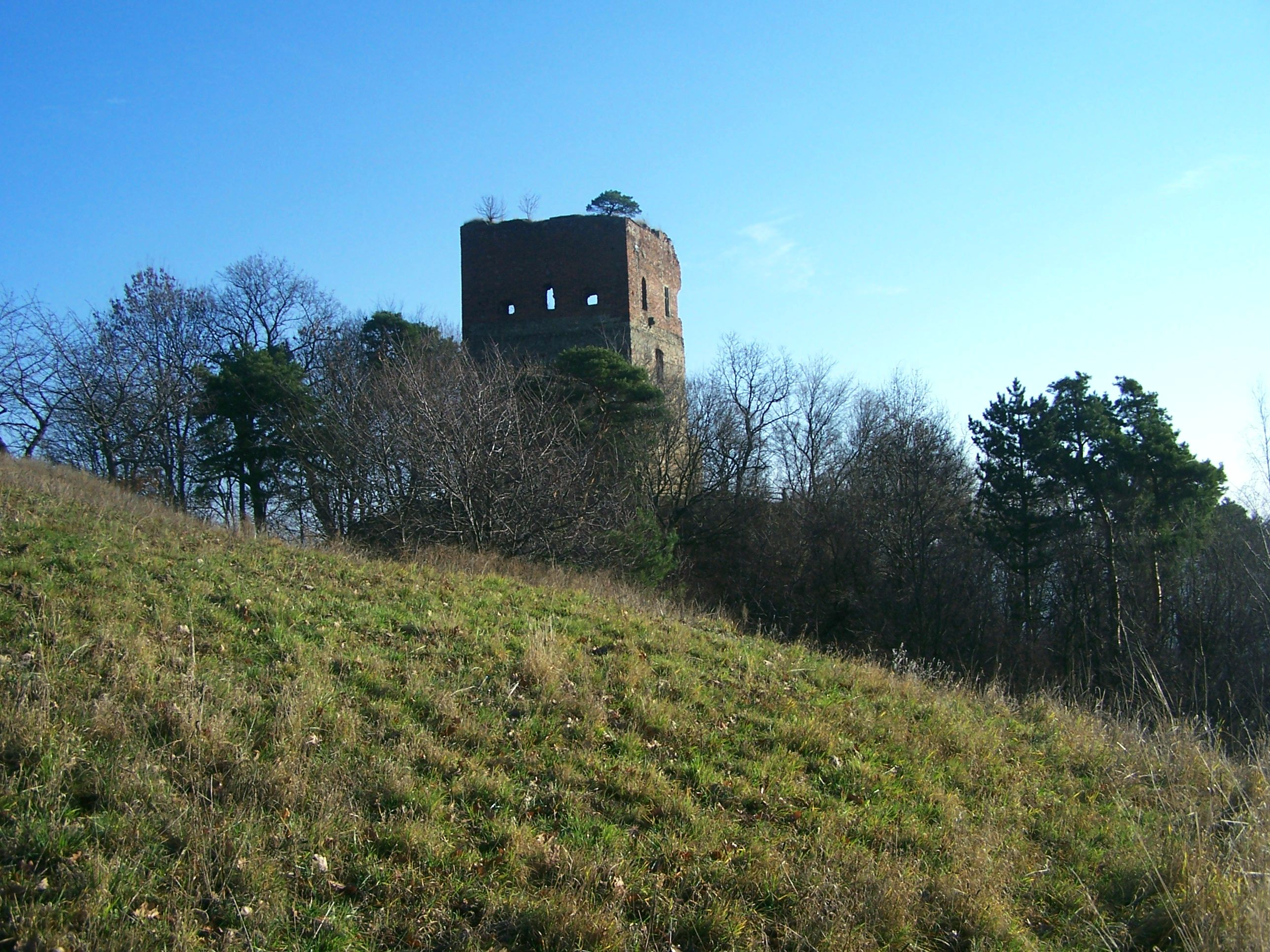 Melsztyn, ruiny zamku